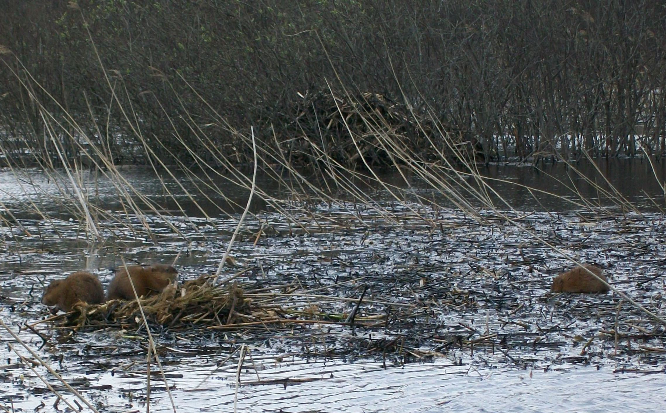 Ондатра